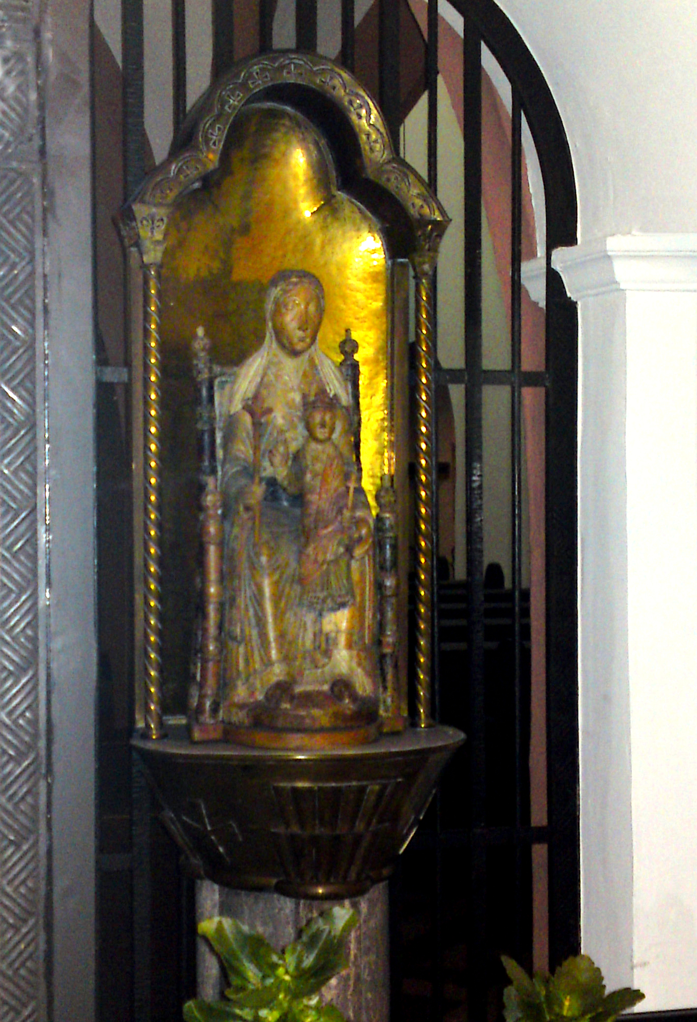 "Hovener Madonna" -holzgeschnitzte Madonnenstatue aus dem 12. Jahrhundert in der Klosterkirche des Klosters ;Marienbaorn Zülpich-Noven (NRW)